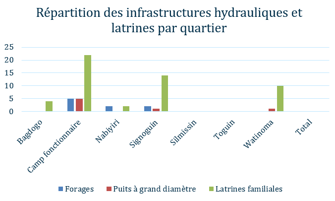 ce graphe représente la répartition des infrastructures hydrauliques et latrines de Zandkom